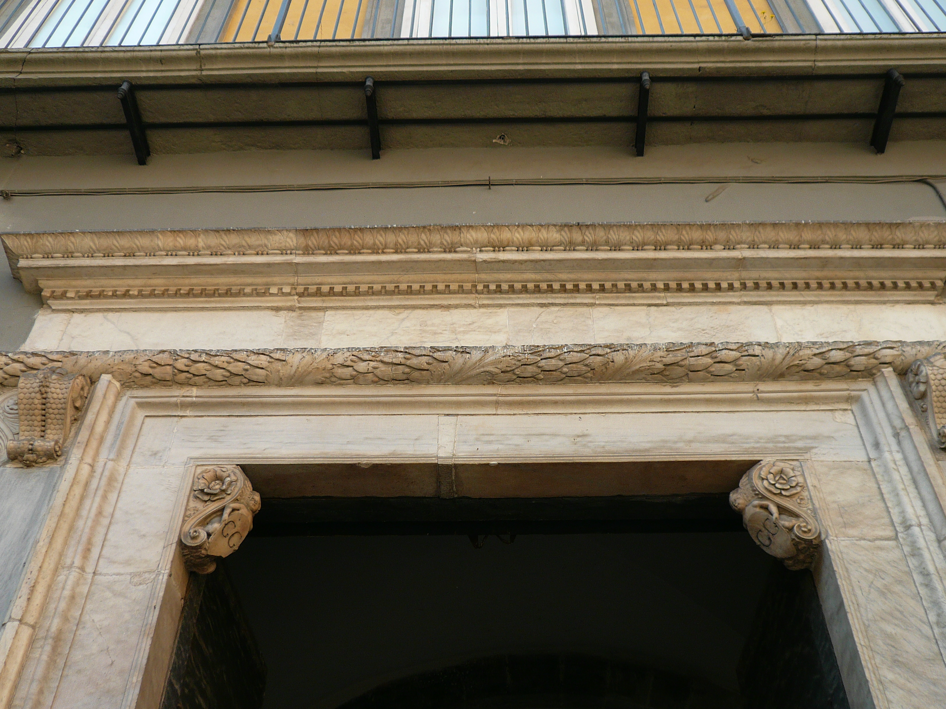 particolare della parte superiore del portale Rinascimentale di Palazzo Petrucci sito in piazza San Domenico Maggiore a Napoli. Autore foto. Roberto De Martino